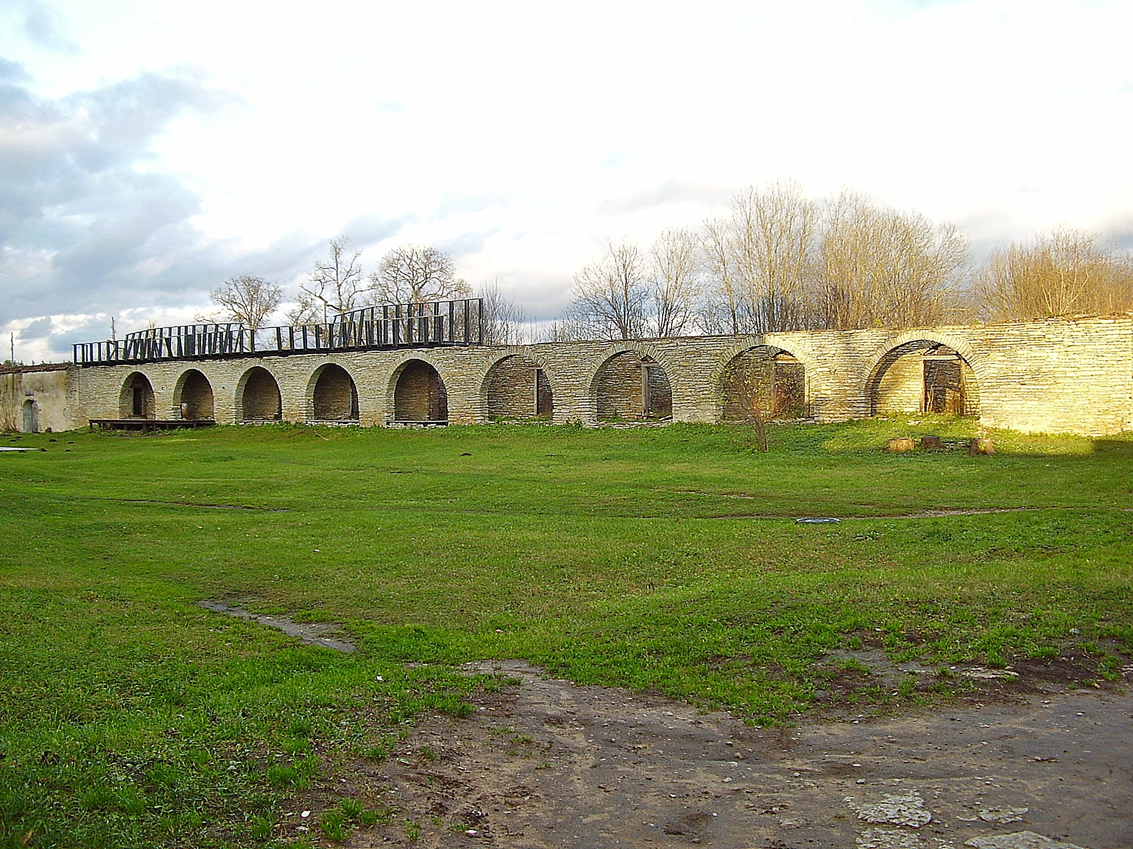 Kolga mõisa ait